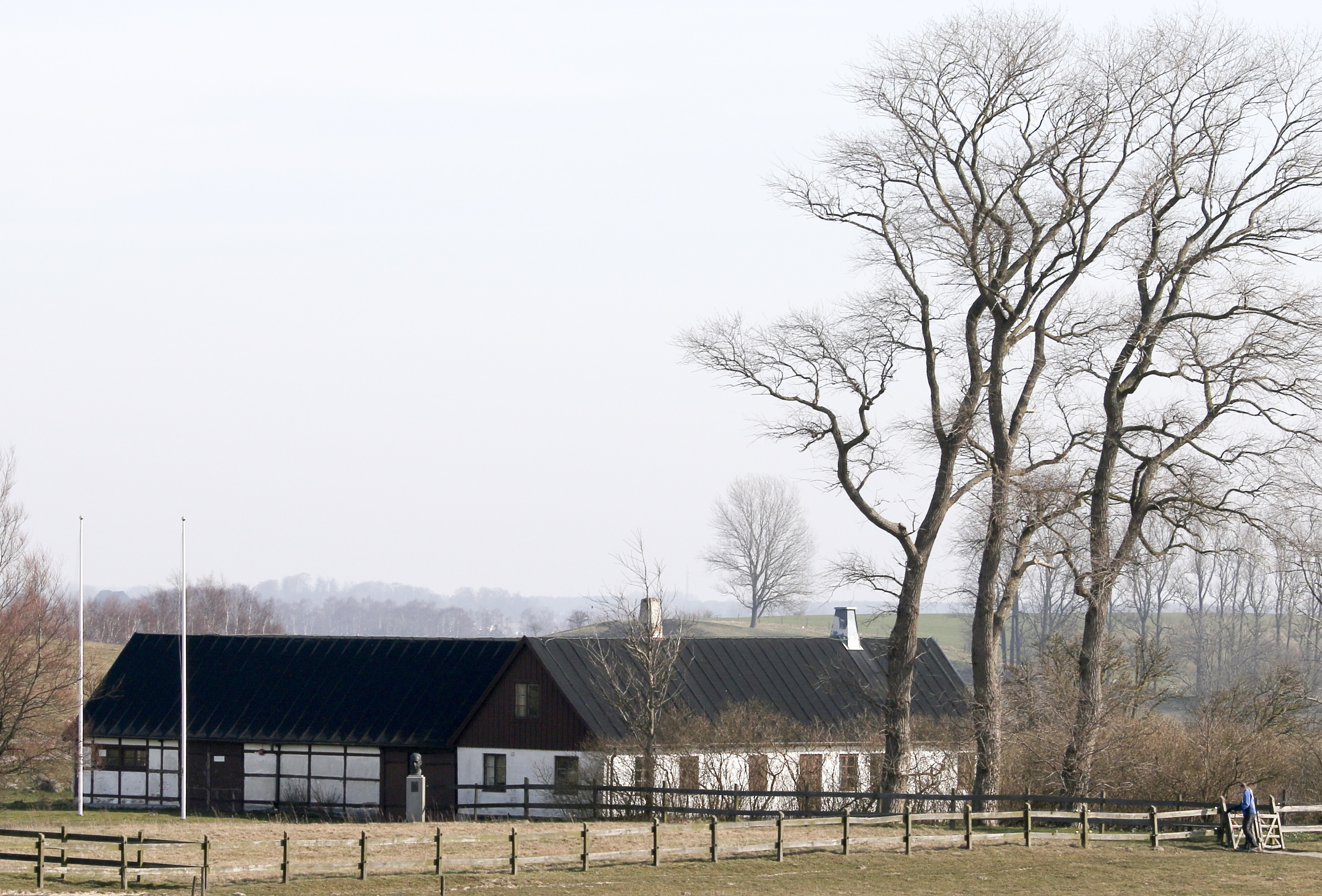 Backåkra, mars 2016